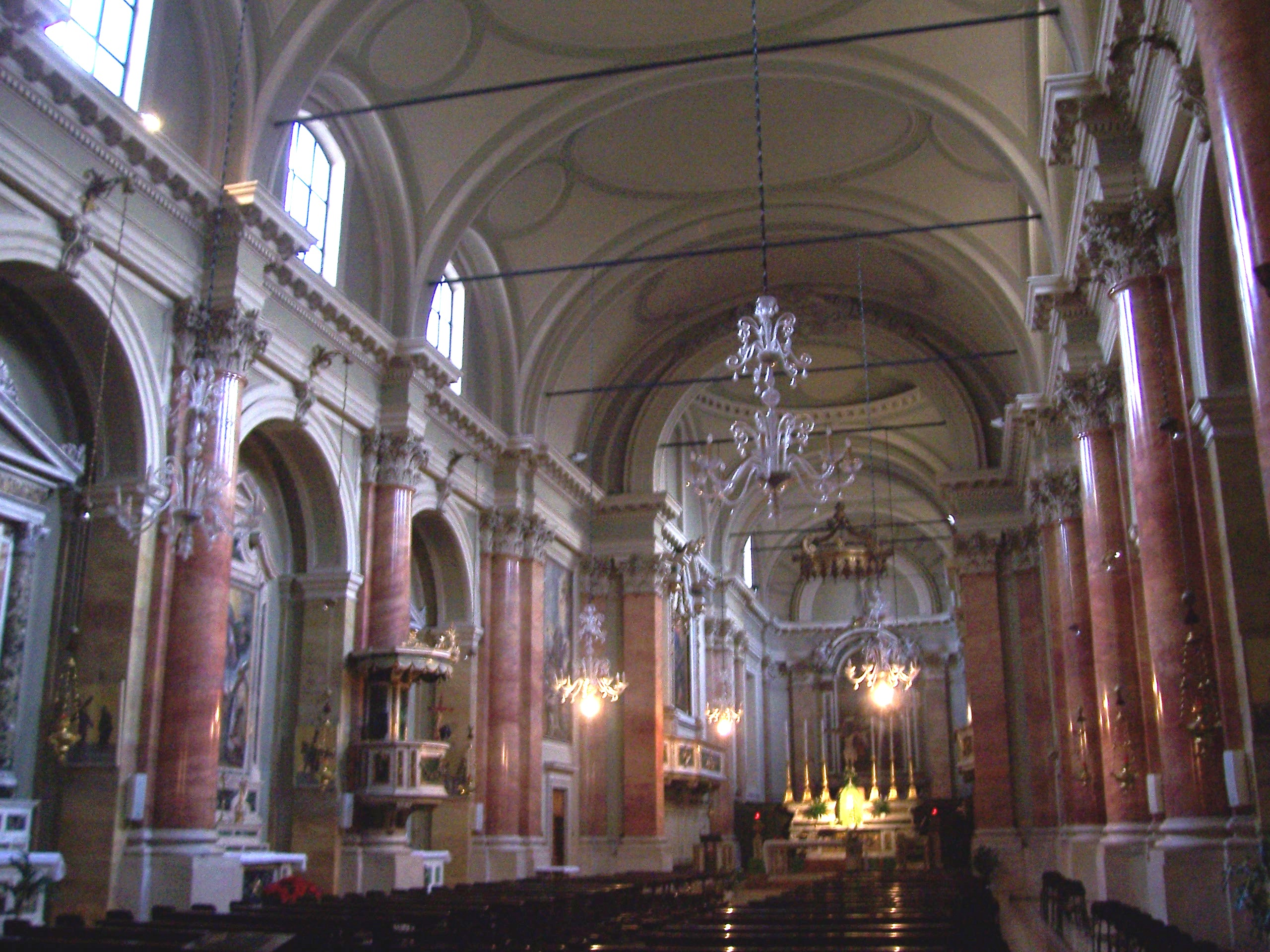 sant'alessandro (brescia) interno.jpg